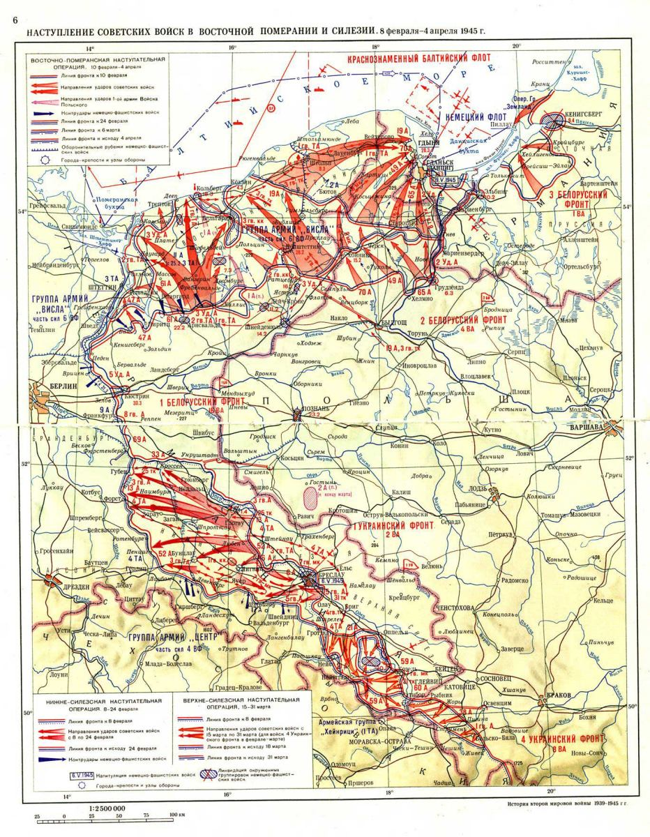 Pomořanská a Slezská operace Rudé armády